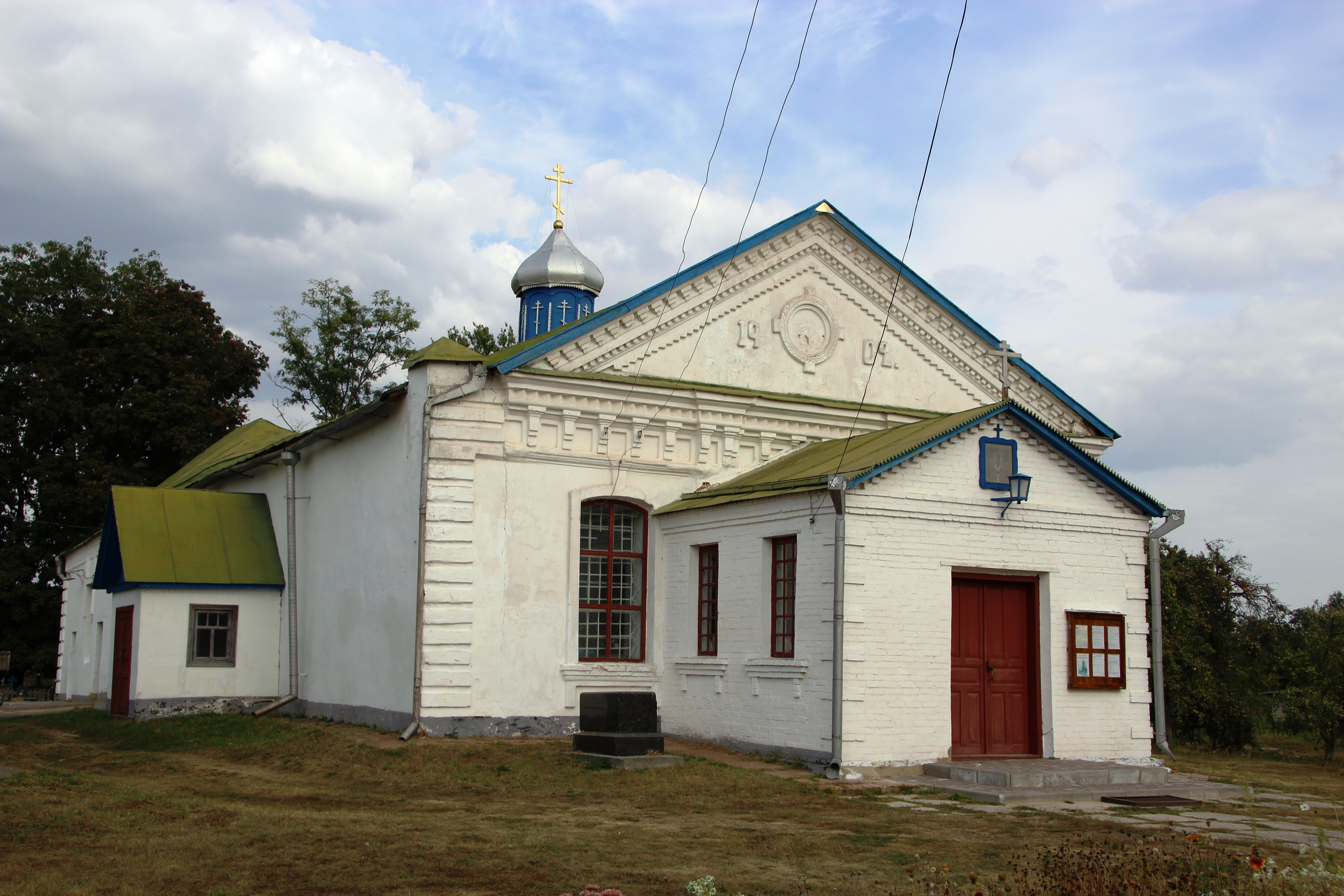 Миколаївська церква, Середина-Буда, вул. Садова